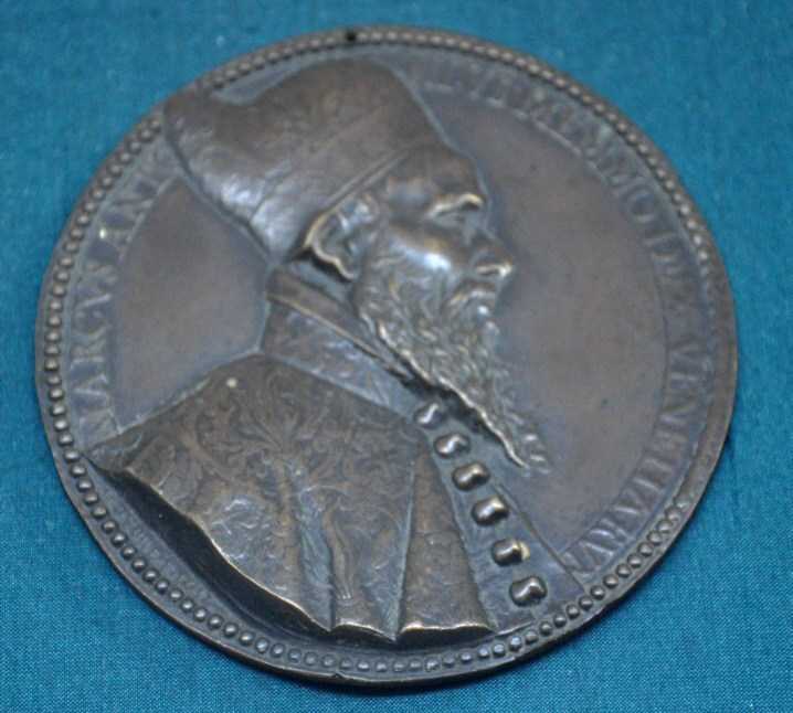 Bronzeplakette Marcantonio Memmo, Doge von Venedig; von Guillaume Dupré, 1612 (hier: vermutlich älterer Nachguss); MARCUS. ANTO=NIUS. MEMMO. DUX.VENETARUM; Museum für Angewandte Kunst, Frankfurt am Main, Inv. Nr. 4005